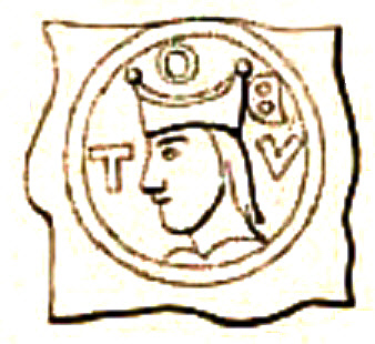 Brakteat der fürstbischöflich Konstanzer Münze in Tiengen mit Bischofsbild aus der Amtszeit von Otto III. von Hachberg